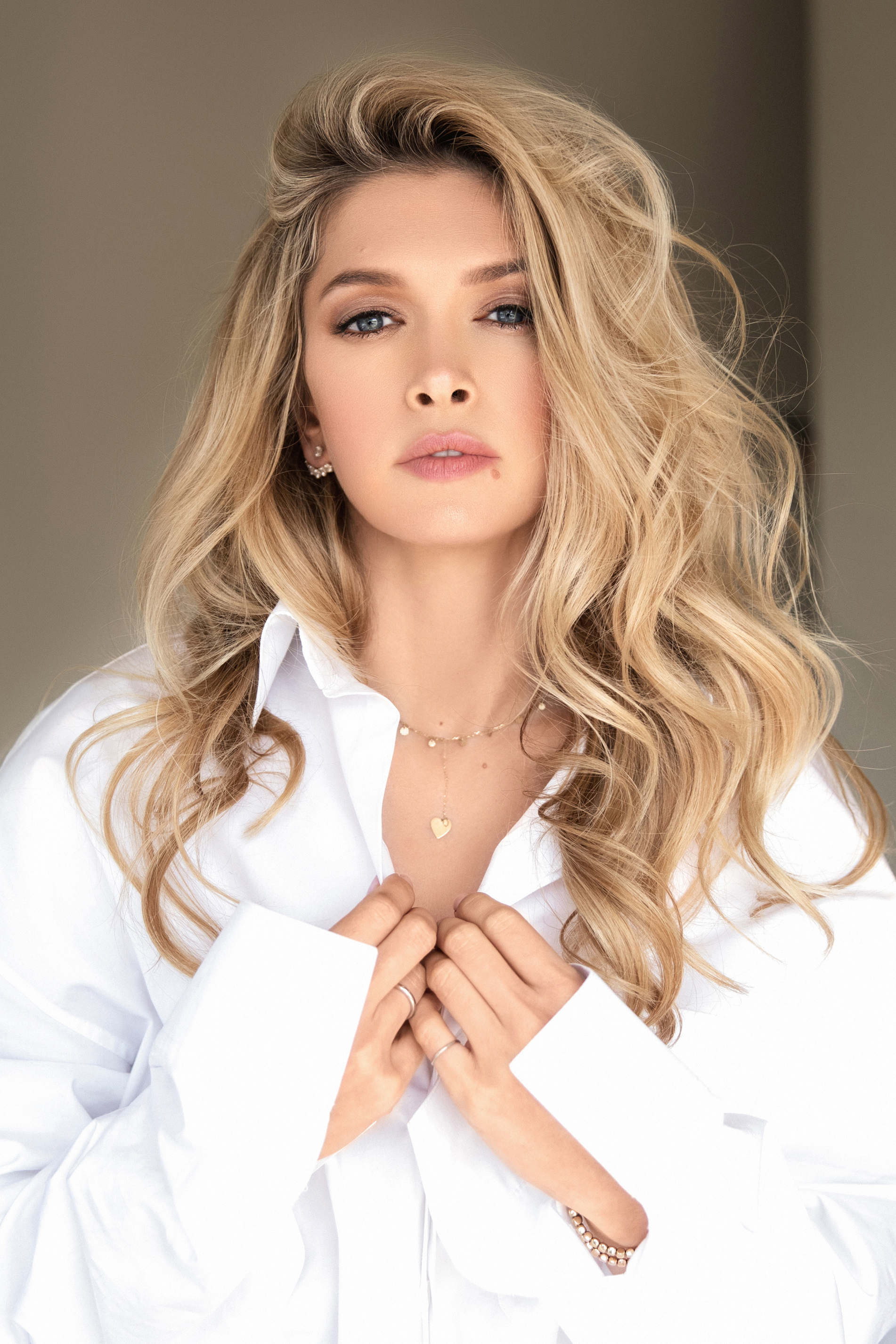 Вера Брежнева в 2017 году